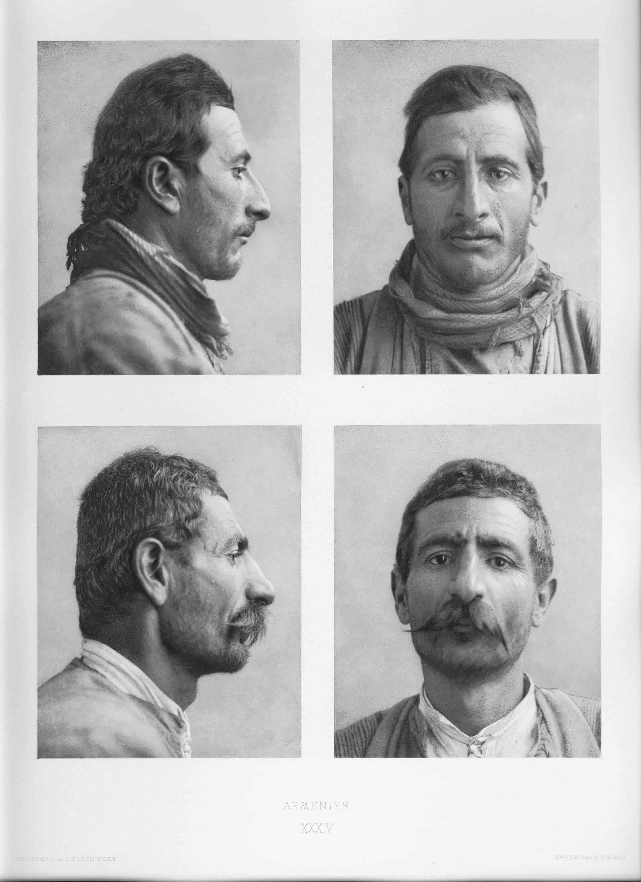 Illustration physischer Merkmale männlicher Armenier